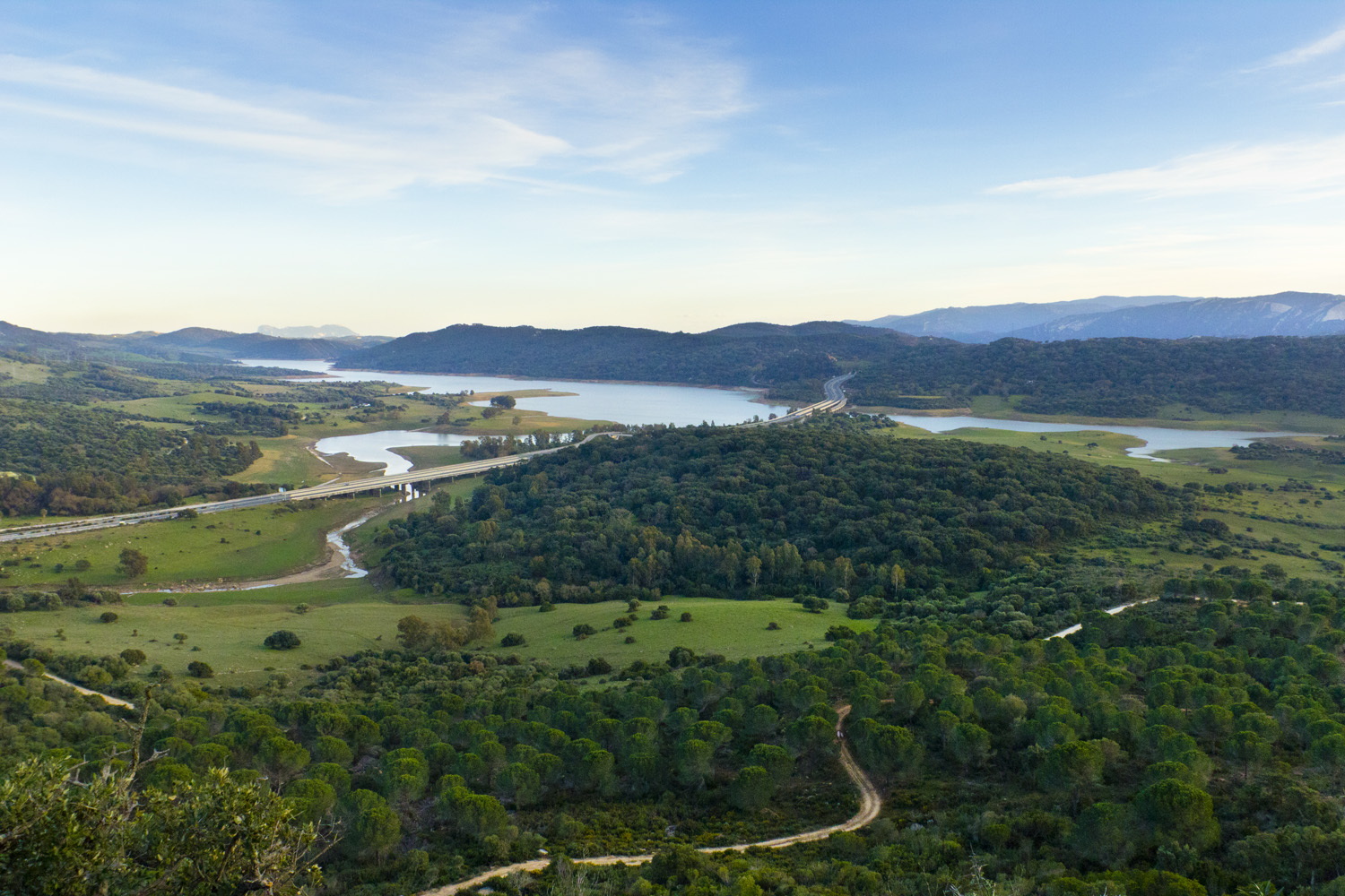 Vista del embalse de Charco Redondo desde la sierra del Junquillo, con el peñón de Gibraltar al fondo, en el centro de la comarca del Campo de Gibraltar y del parque natural de Los Alcornocales. This is a photography of a Special Area of Conservation in Spain with the ID: ES0000049. Natura2000 entry, EEA entry